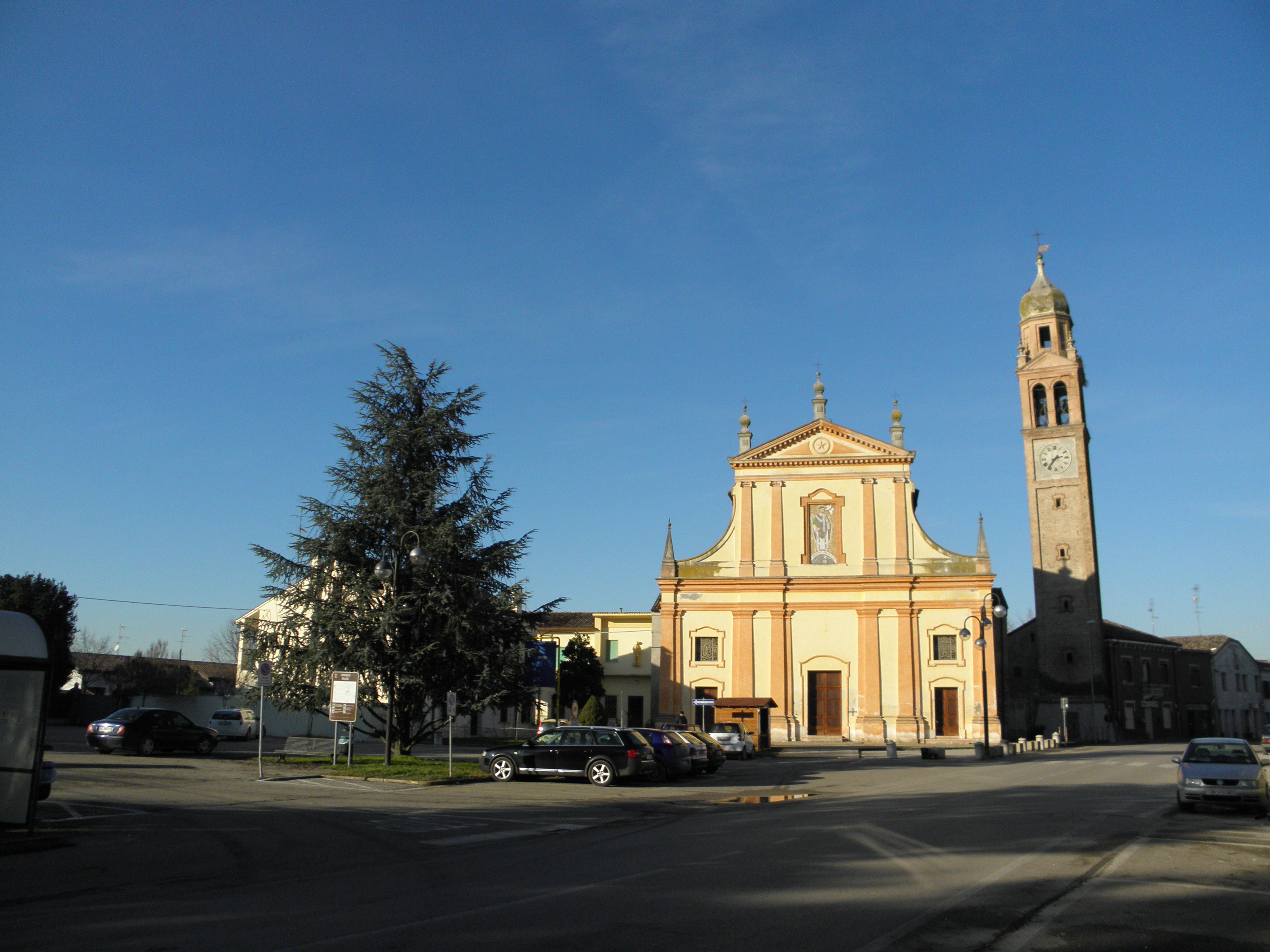 Salara, comune della provincia di Rovigo: il piazzale antistante la chiesa parrocchiale di San Valentino che lambisce la principale Via Roma (Strada Provinciale 1).